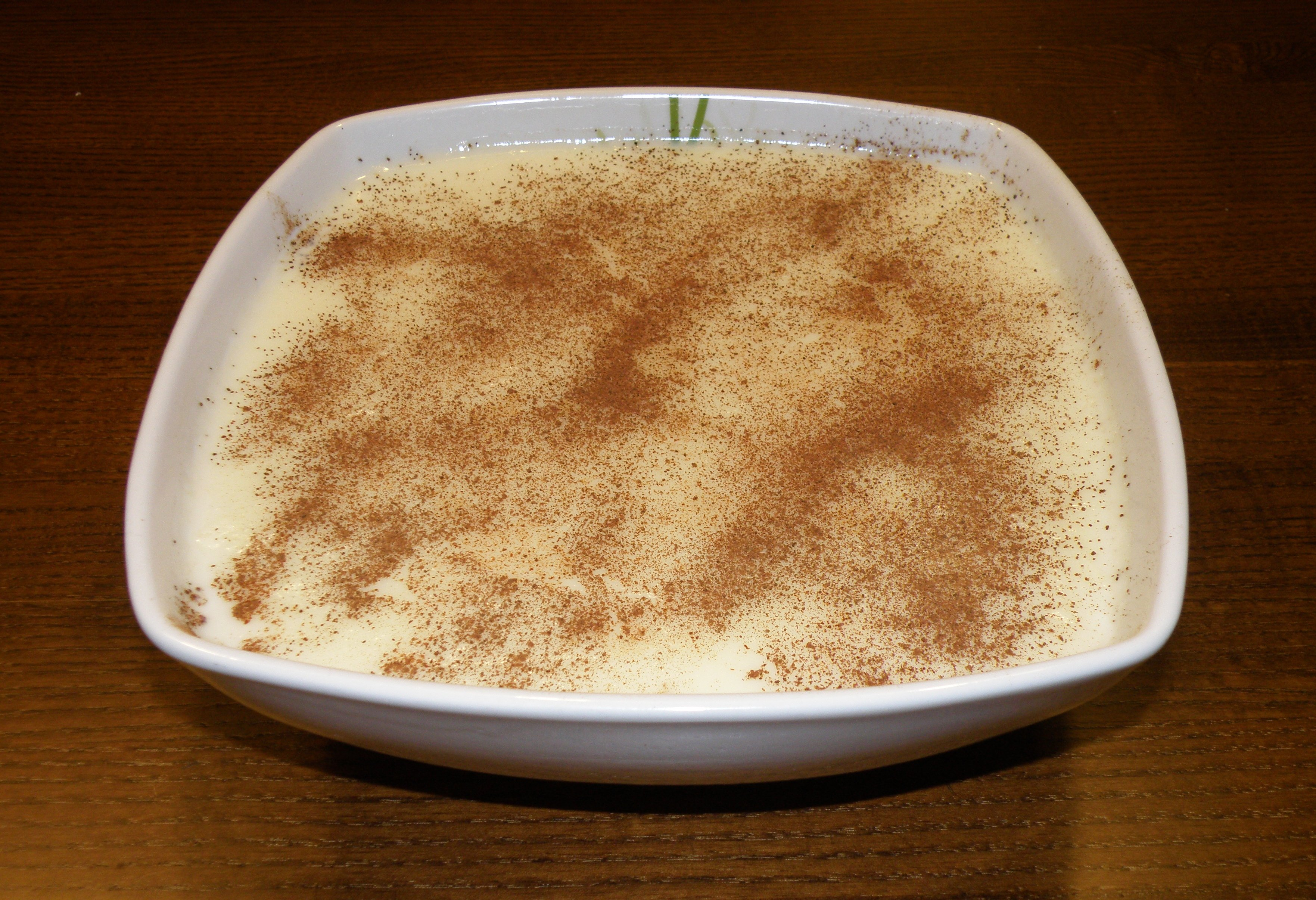 Arroz com leite, sobremesa típica de Ferrol (Galiza)